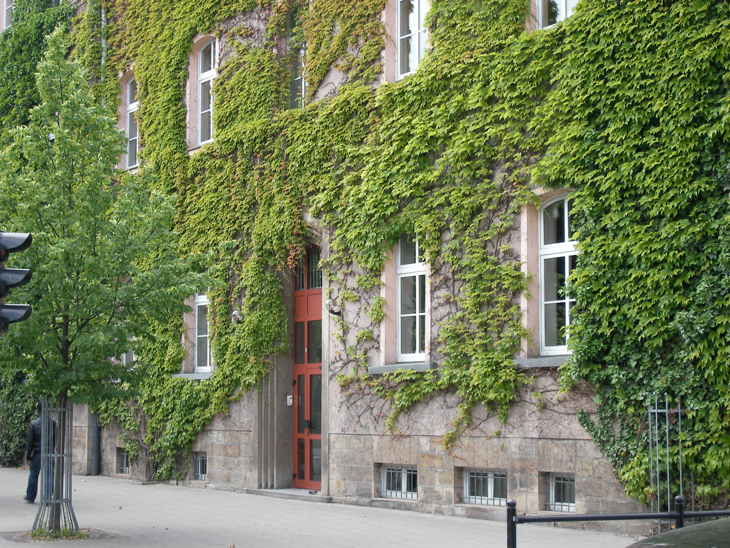 Bild des Goethegymnasiums Weißenfels